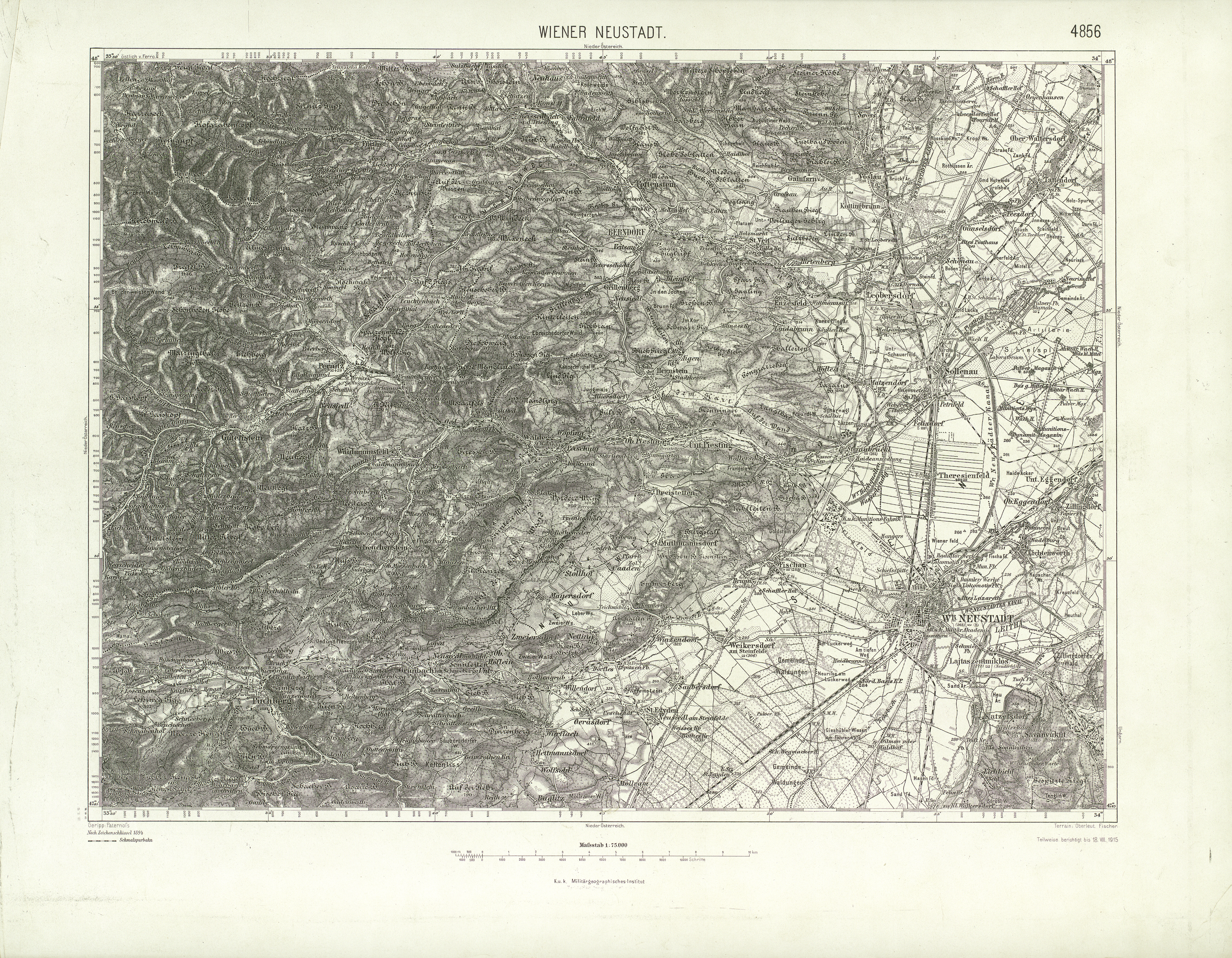 historische Landkarte: Spezialkarte 1:75.000, franzisco-josephinische (3.) Landesaufnahme der österreichisch-ungarischen Monarchie. Blatt Wiener Neustadt 4856 (südliches Wiener Becken, mit Gutenstein, Puchberg, Wöllersdorf, Sollenau, Vöslau, Pottenstein).